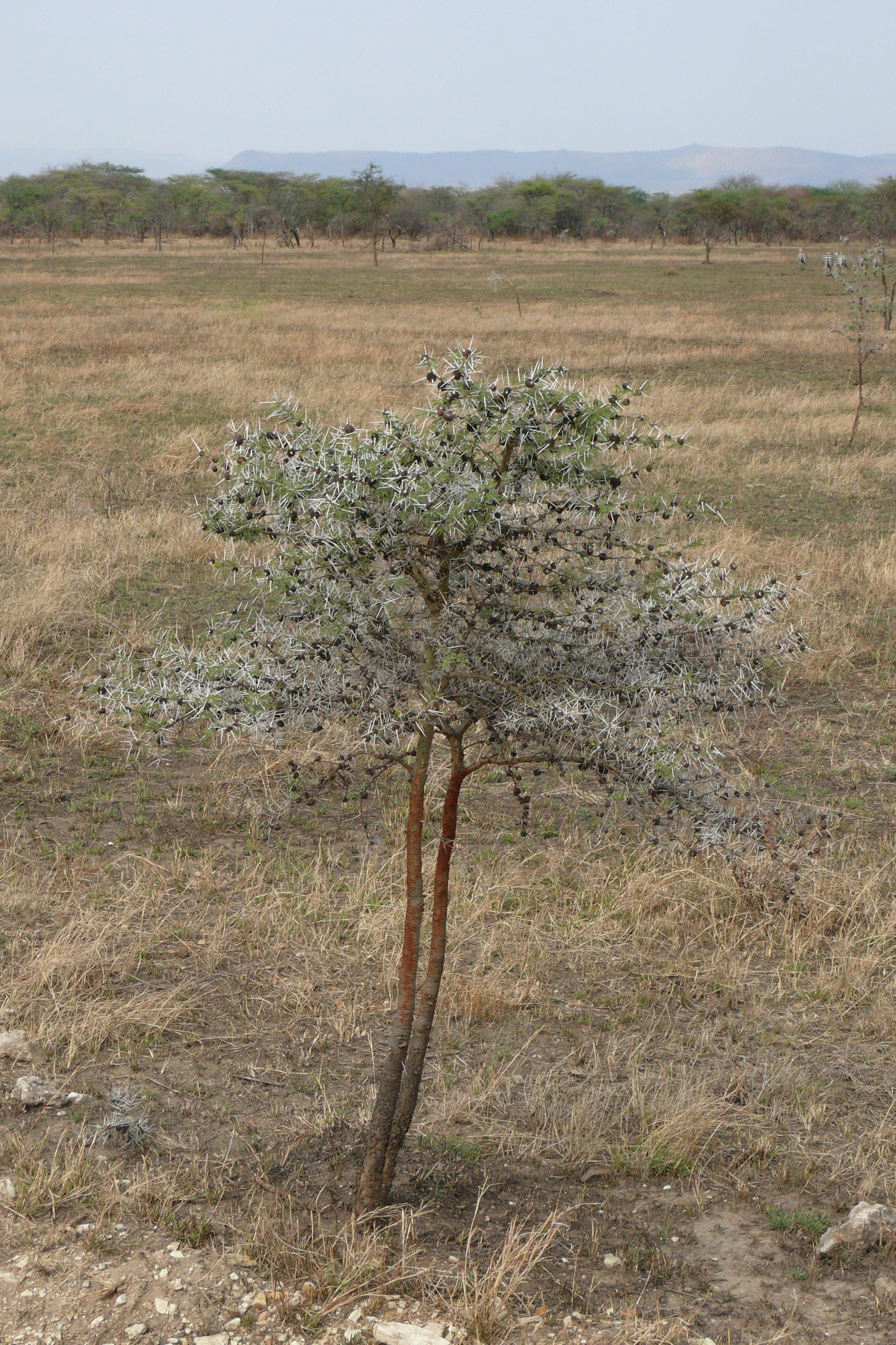 Flötenakazie (Acacia drepanolobium)